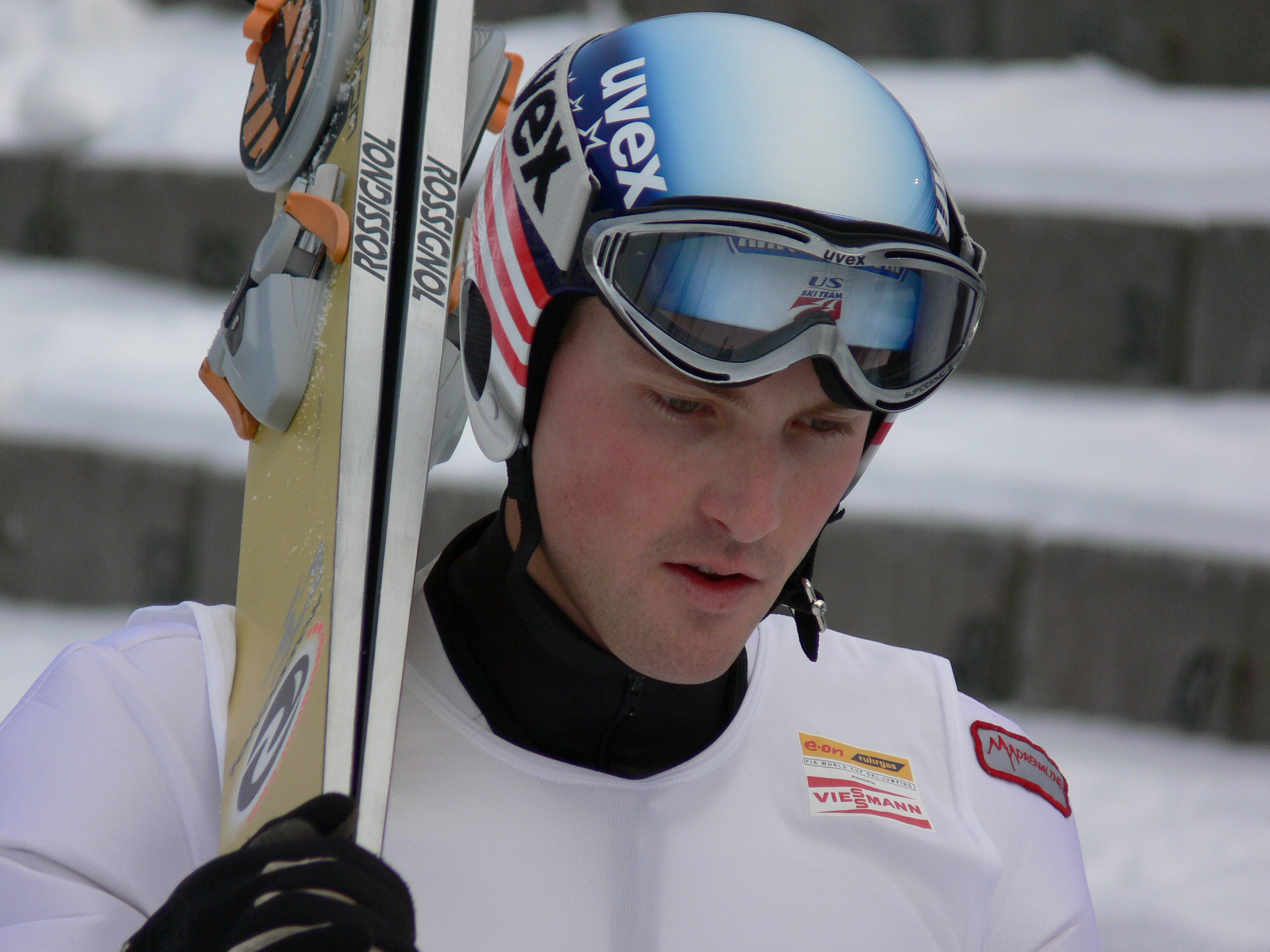 American ski jumper Alan Alborn. Taken during a WC event in Holmenkollen, Norway.